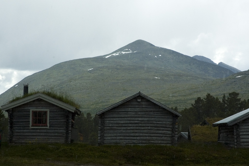 Fiskevollen